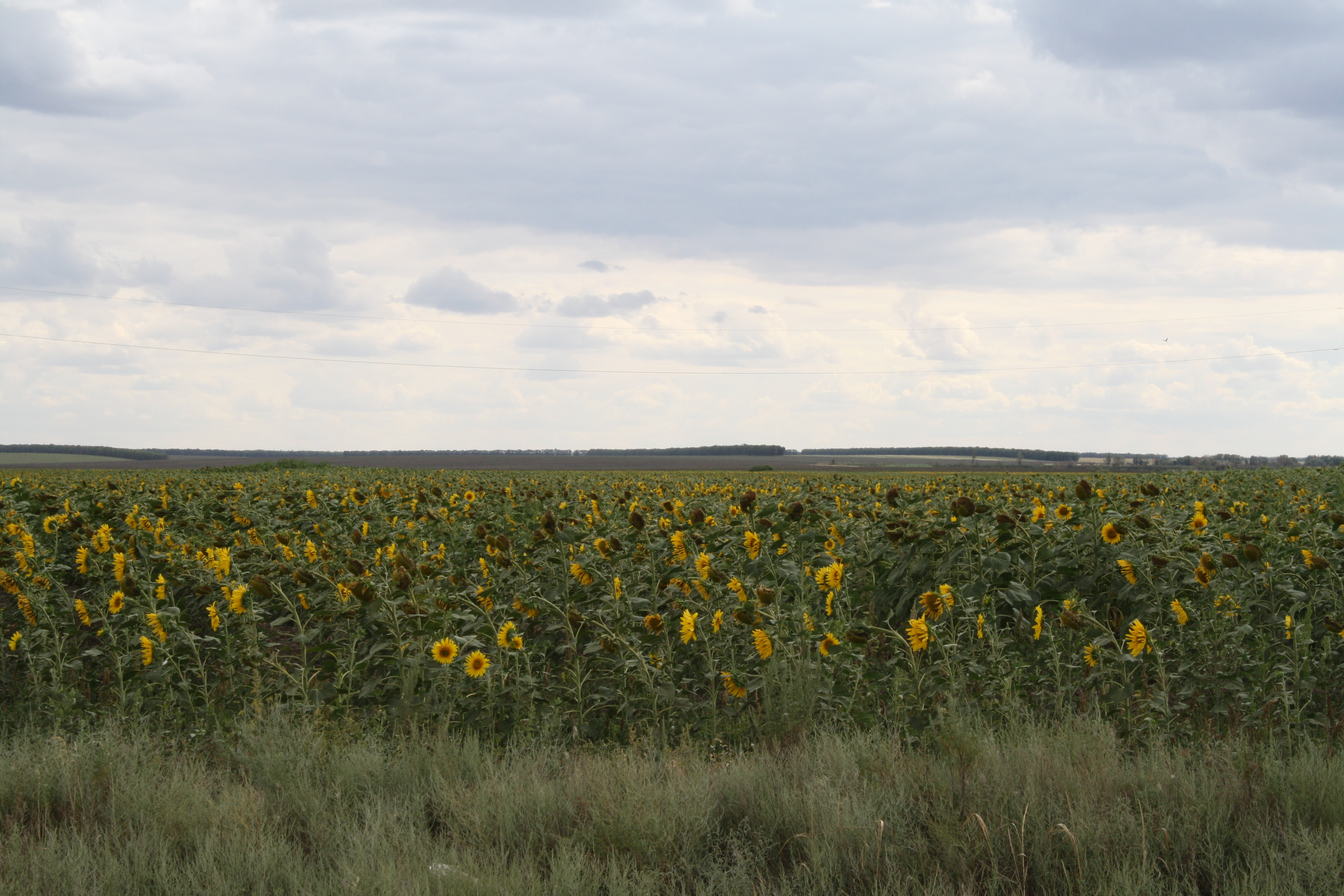 Sunflower field. Samara reg. Russia. Подсолнечное поле. Самарская обл. Россия